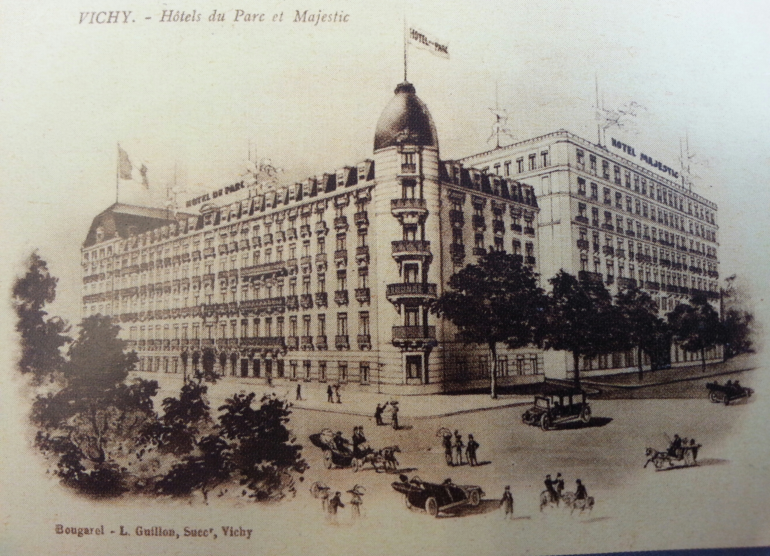 Gravure publicitaire de l'hôtel du Parc à Vichy